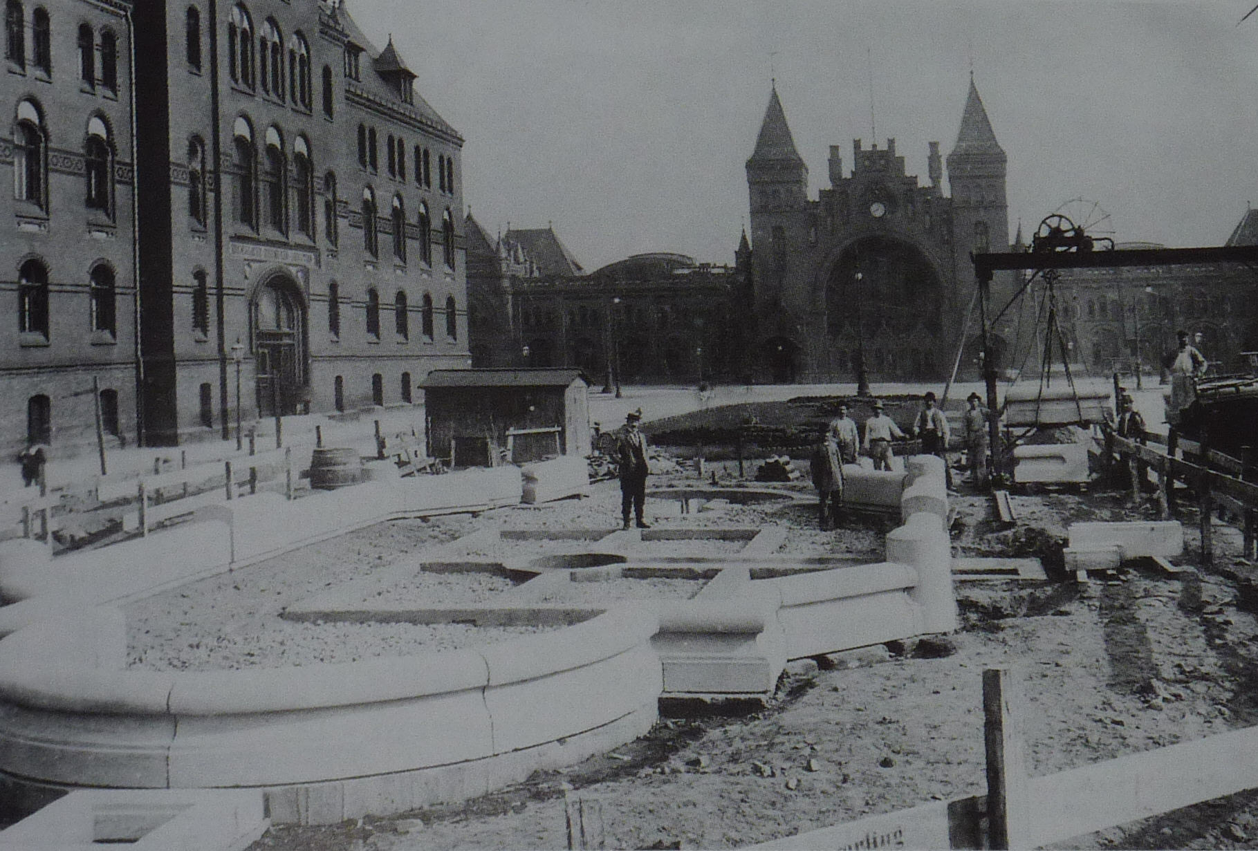 Baustelle des Stuhlmannbrunnens in Altona.